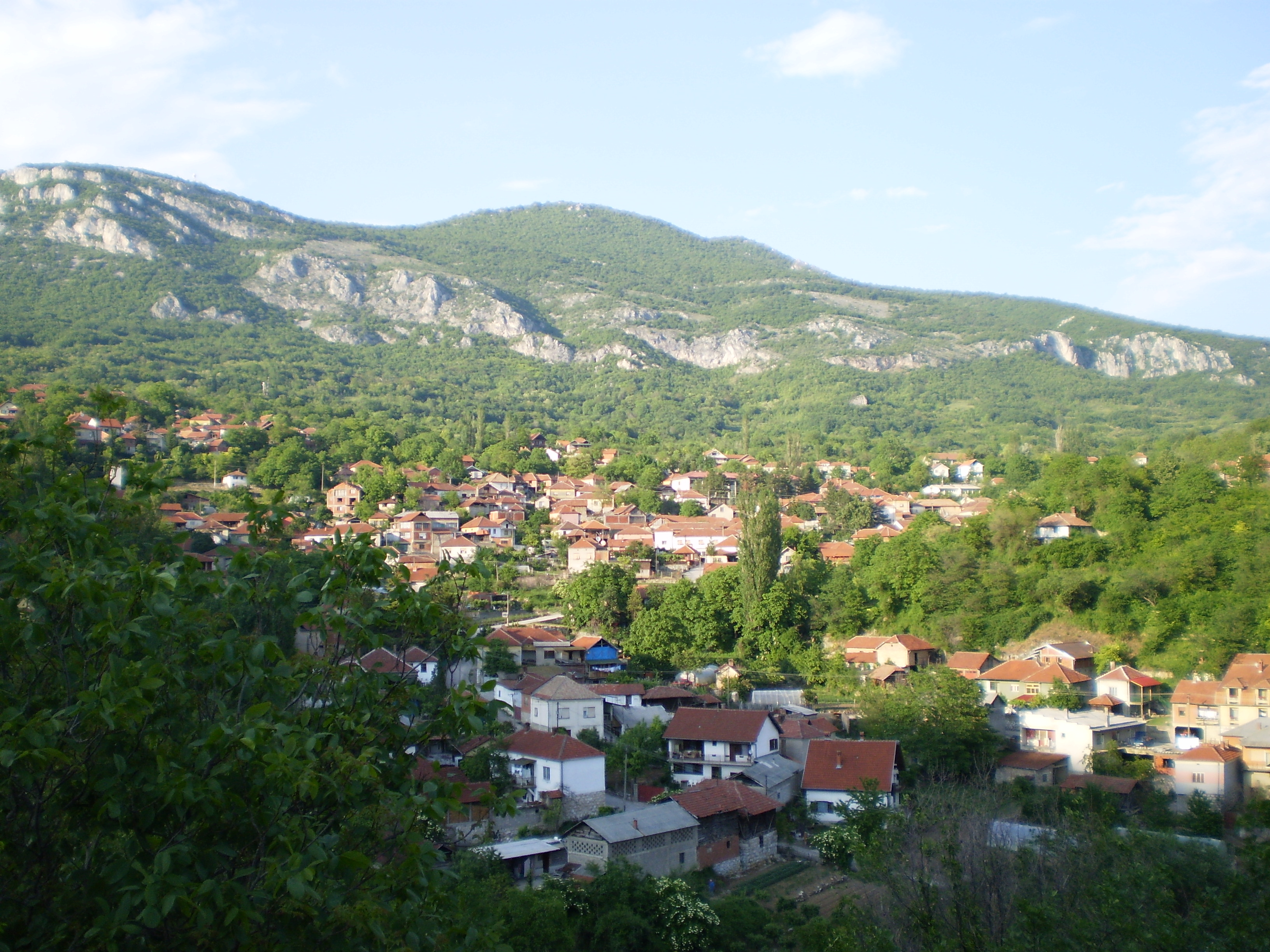 Sićevo. Naselje brdskog tipa